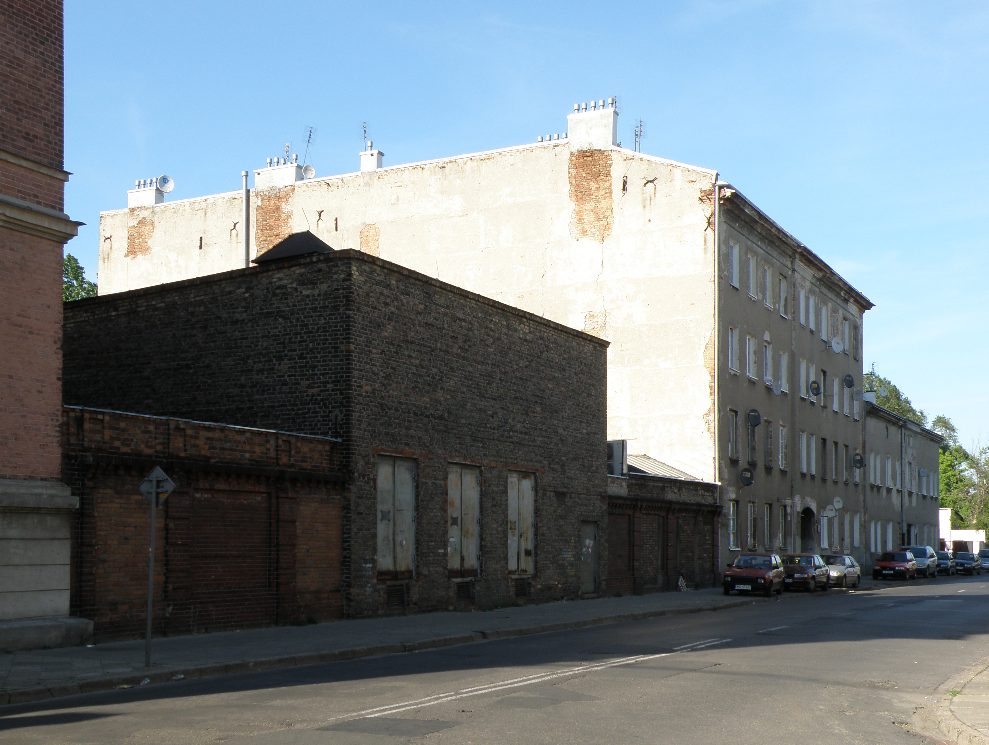 Zespół d. manufaktury „Juta”, później zakładów amunicyjnych „Pocisk” (A-926 z 23.07.2010), ul. Mińska 25, Warszawa